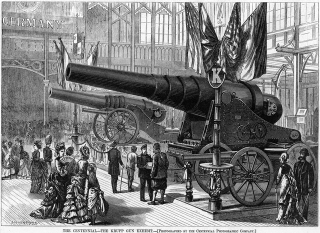 Krupp Exhibit, 1876 Centennial Exhibition, Philadelphia